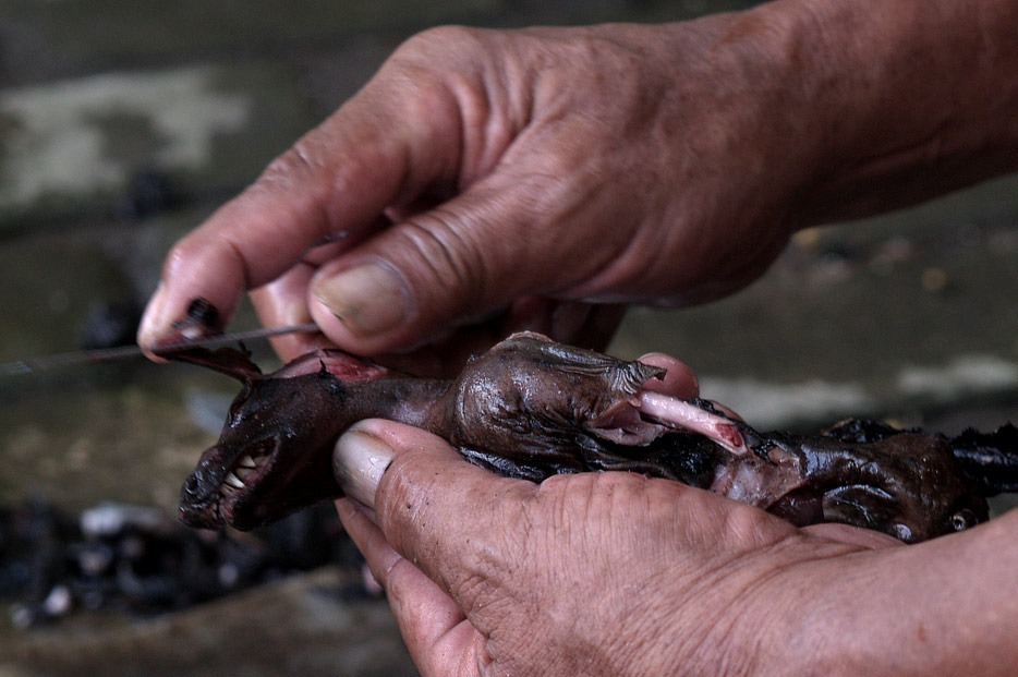 あぶった食用コウモリをスライスしているところ